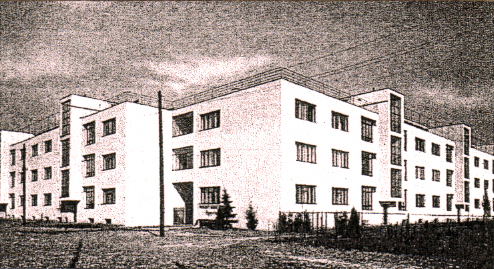 pohľad na obytný súbor košickej kolónie bankových úradníkov